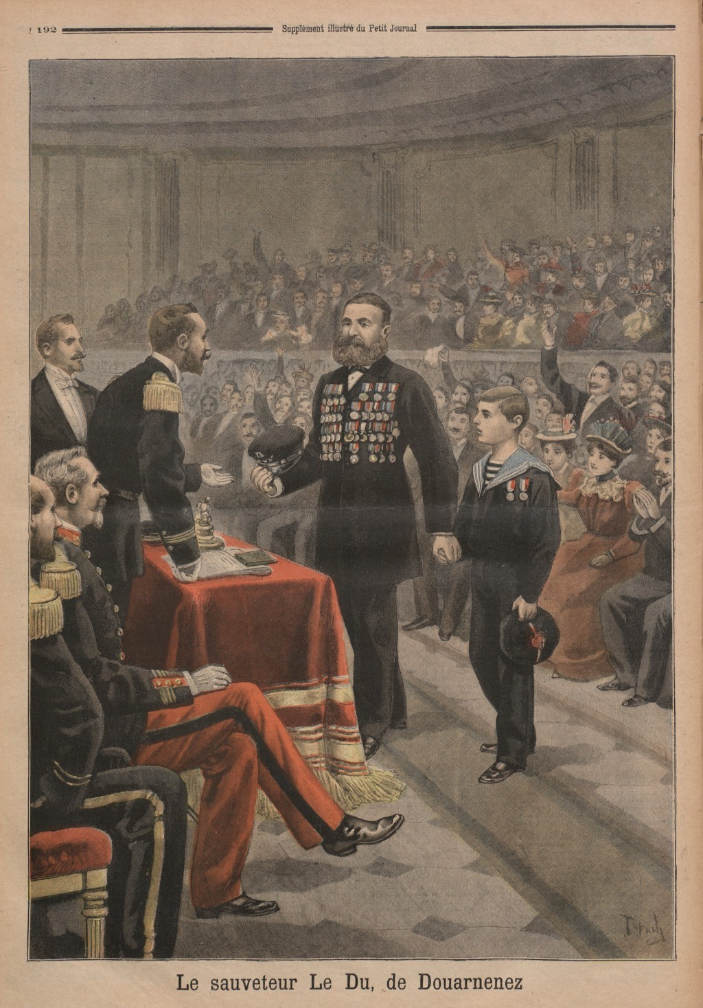 Gravure d'Osvaldo Tofani pour le Supplément du dimanche du Petit Journal du 13 juin 1897 représentant la décoration du sauveteur Jacques le Du de Douarnenez lors de la cérémonie annuelle de la Société Centrale de Sauvetage des Naufragés.